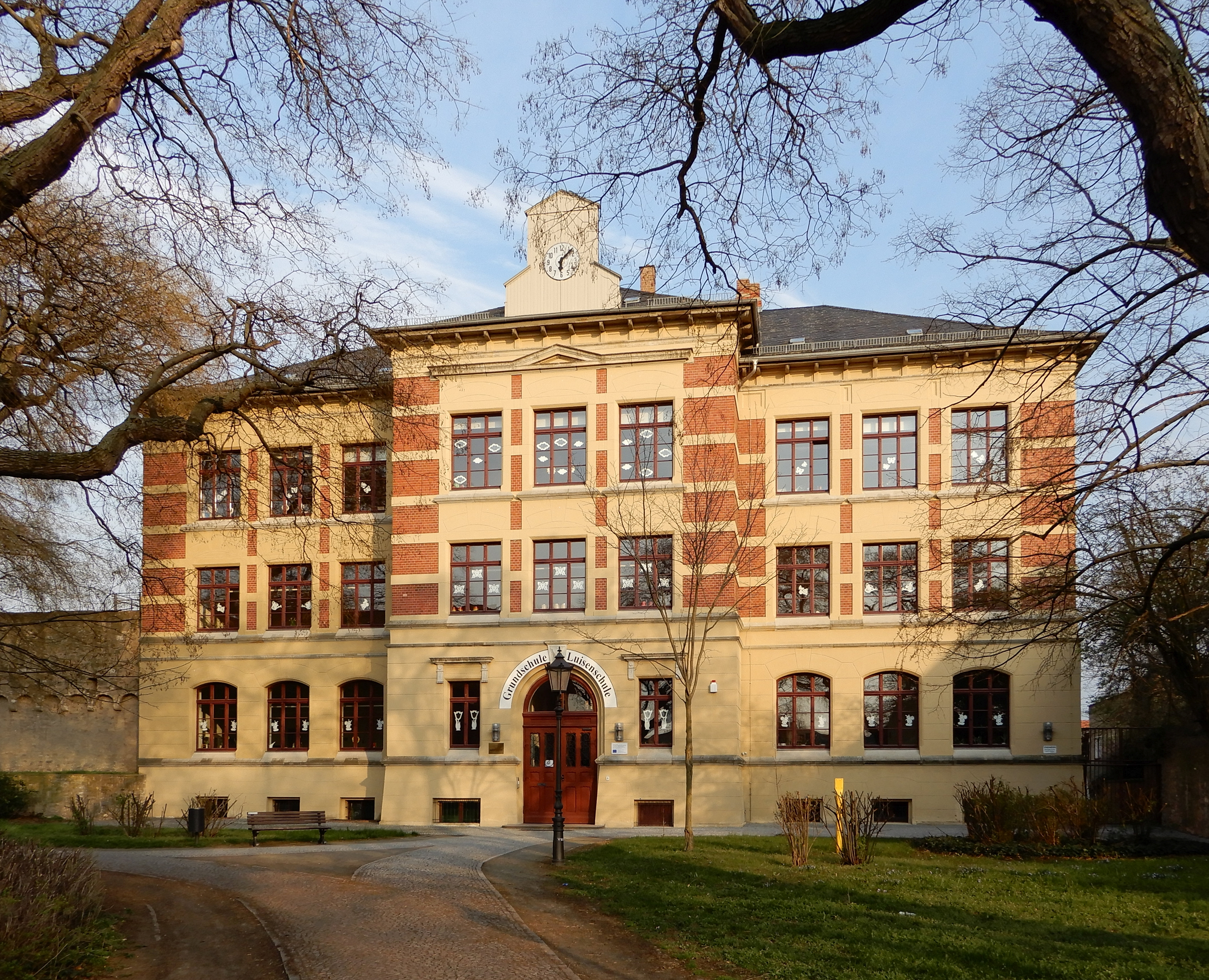 Gebäude Lindenstraße 71-73 in Aschersleben